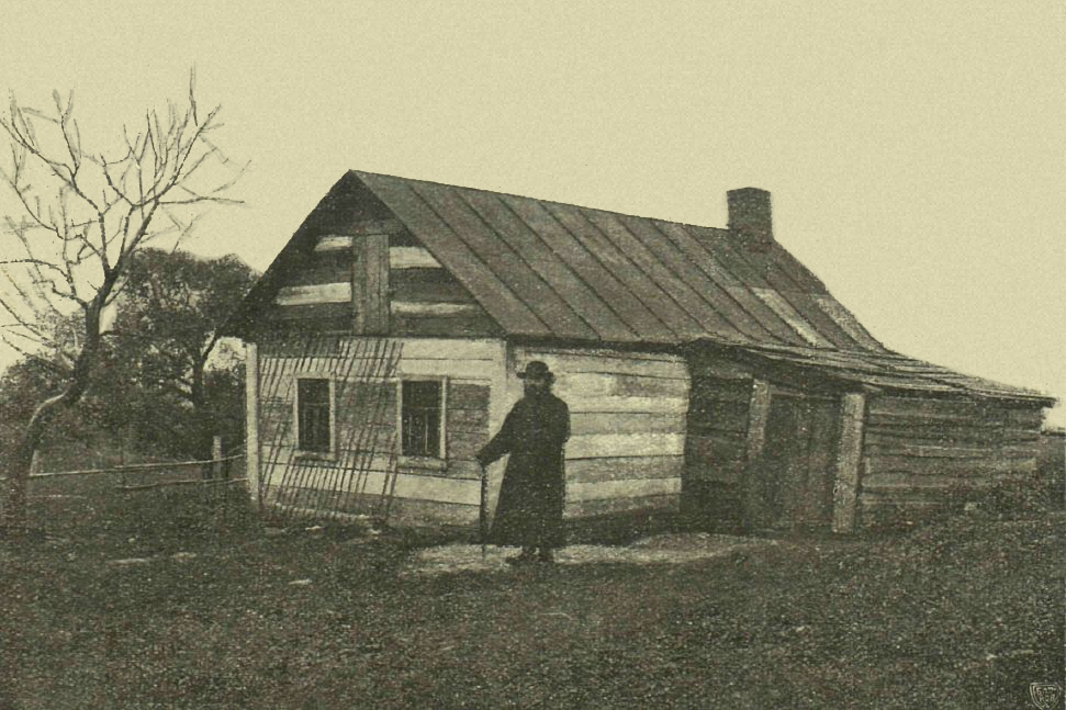 Дом преп. Евфросинии